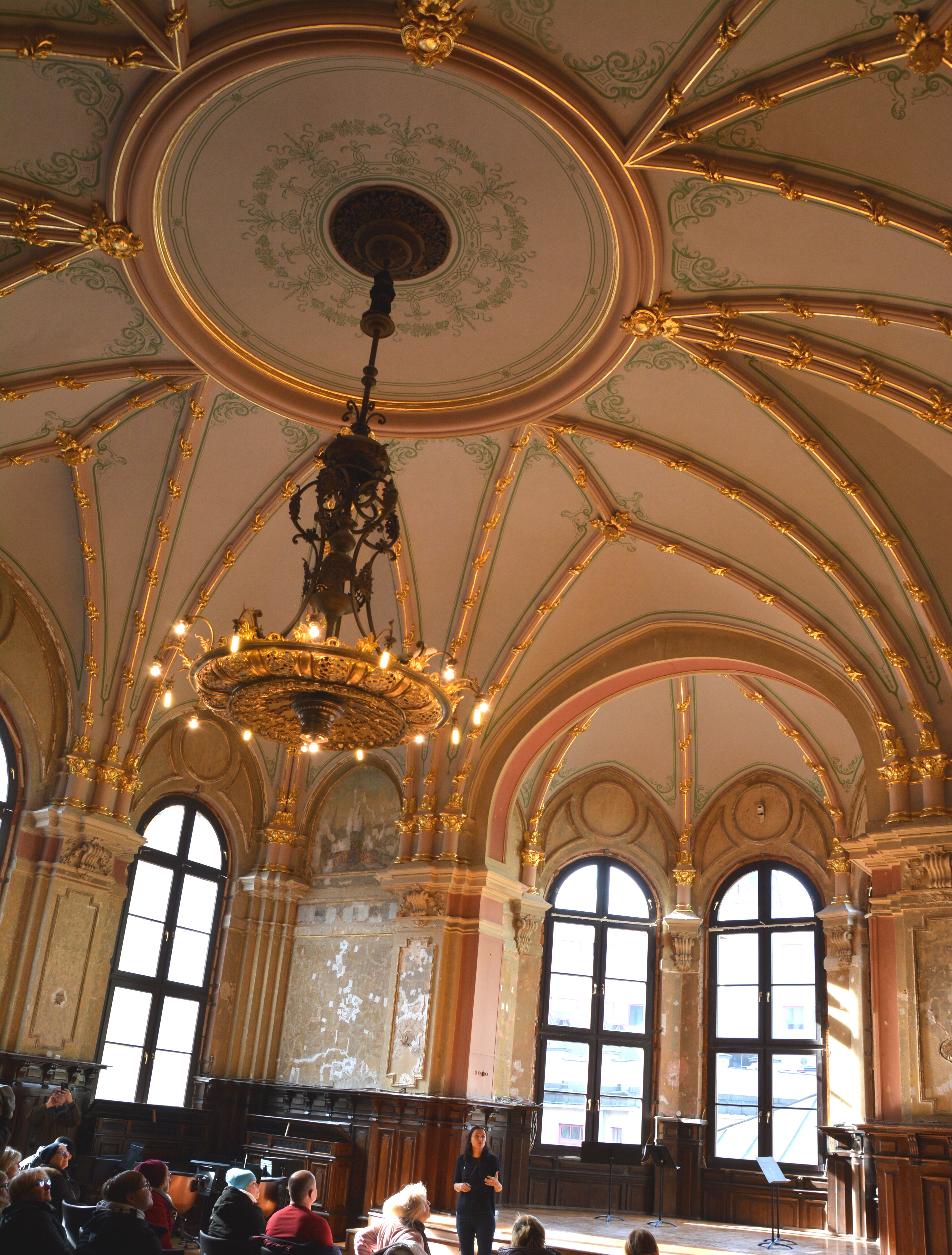 Dawna sala posiedzeń w Pałacu Ziemstwa w Szczecinie